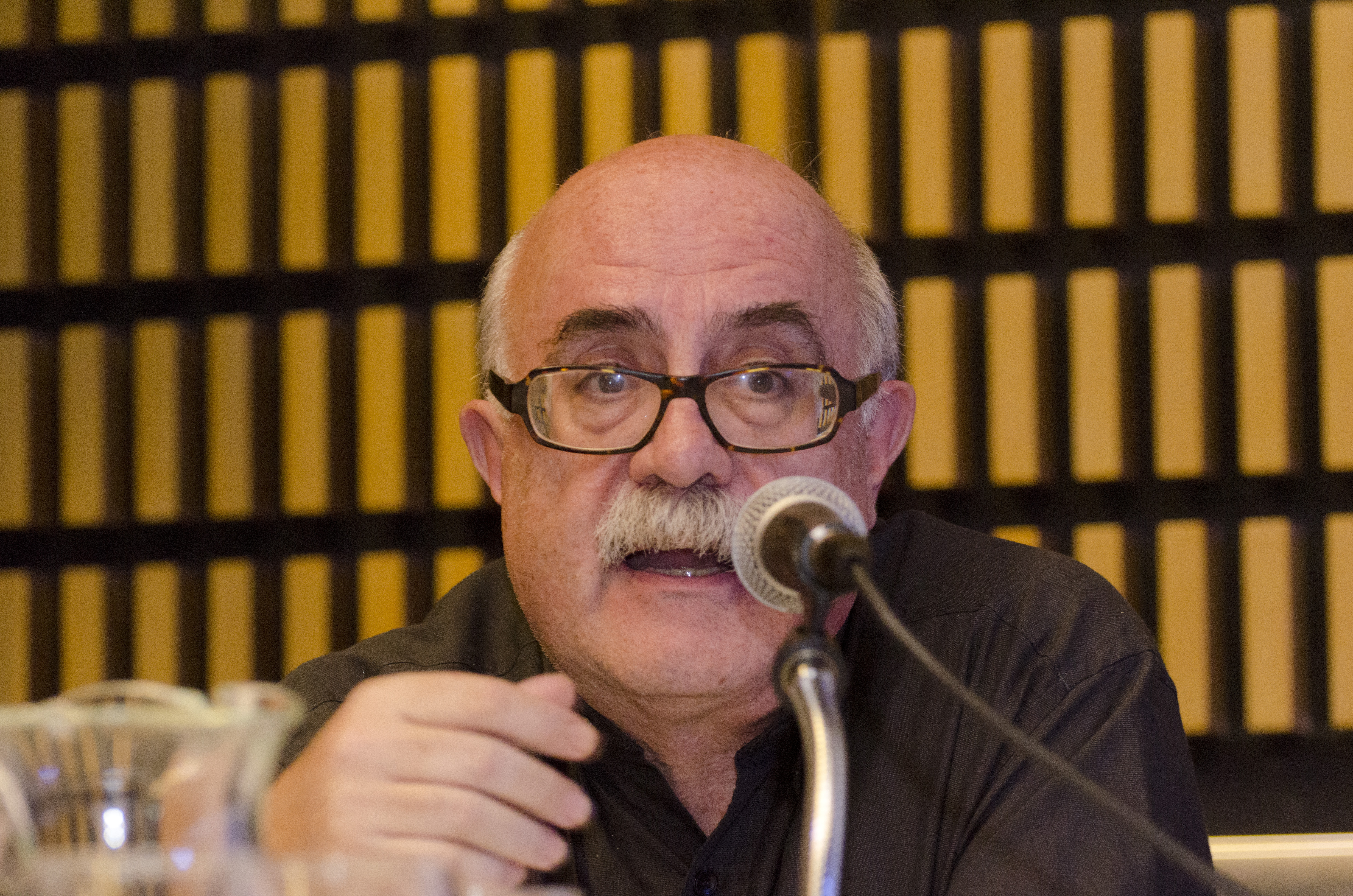 "Programas en sinergía: Iberescena e Iberrutas" en MICA 2015. Buenos Aires, 5 de septiembre de 2015 - En el marco del MICA 2015, se presentó la mesa "Programas en sinergía: Iberescena e Iberrutas". Participaron Juan Meliá (Iberescena), Guillermo Heras (Iberescena), Mónica Guariglio (Iberrutas, directora Nacional de Política cultural y cooperación internacional). Modera: Guillermo Parodi (Instituto Nacional del Teatro - INT). Fotos: Romina Santarelli / Ministerio de Cutura de Nación.